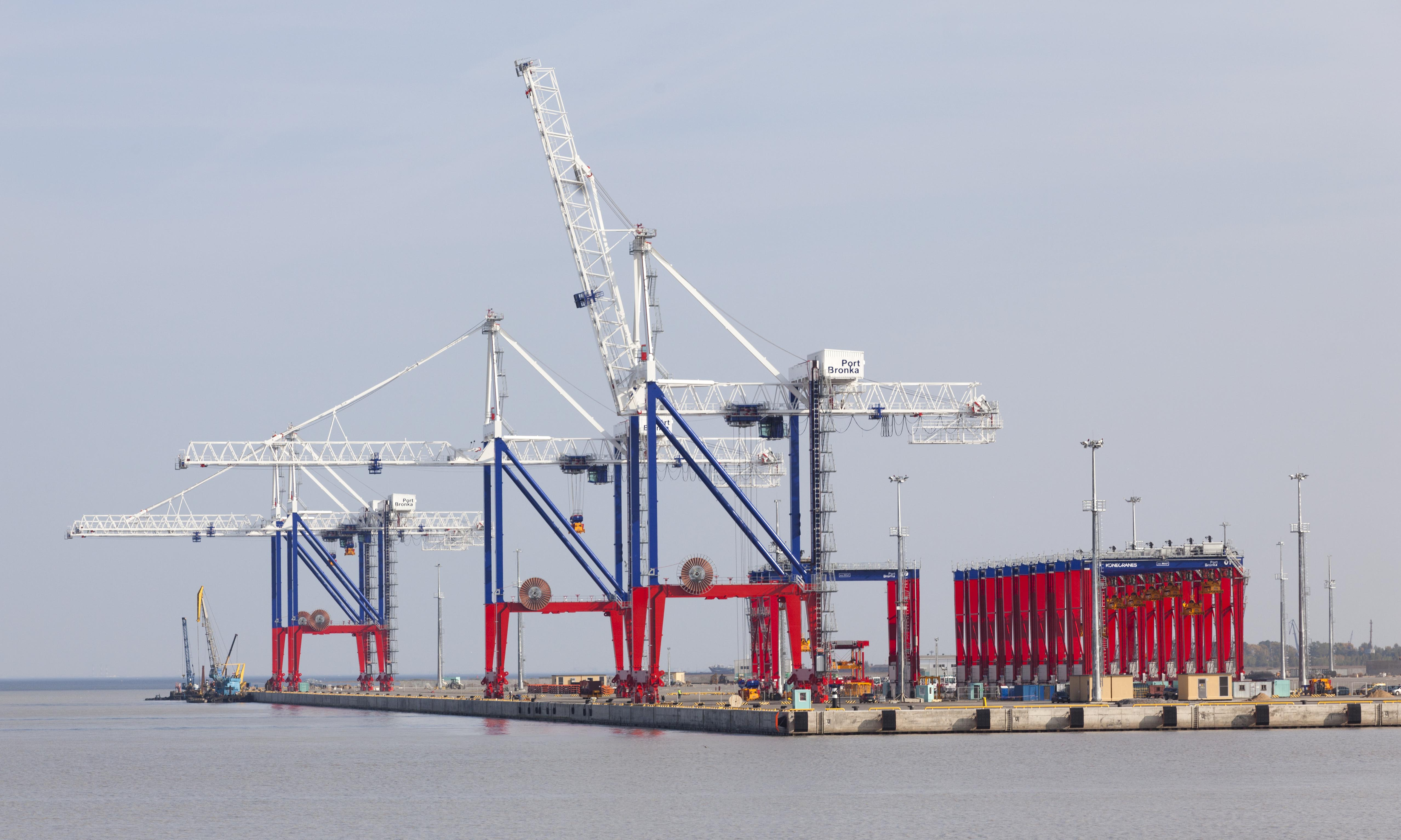 Фото